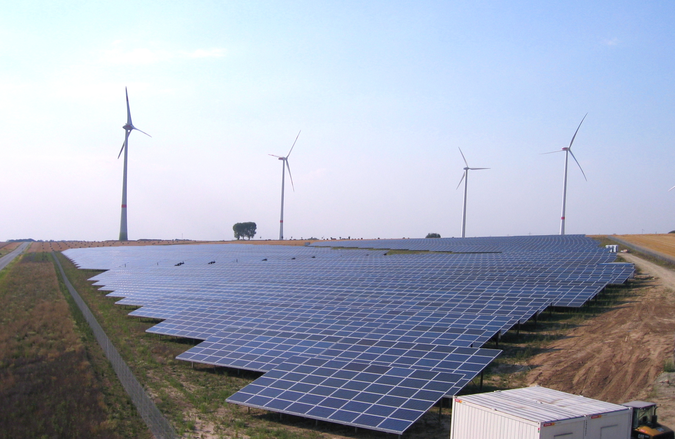 Solarpark Pölzig